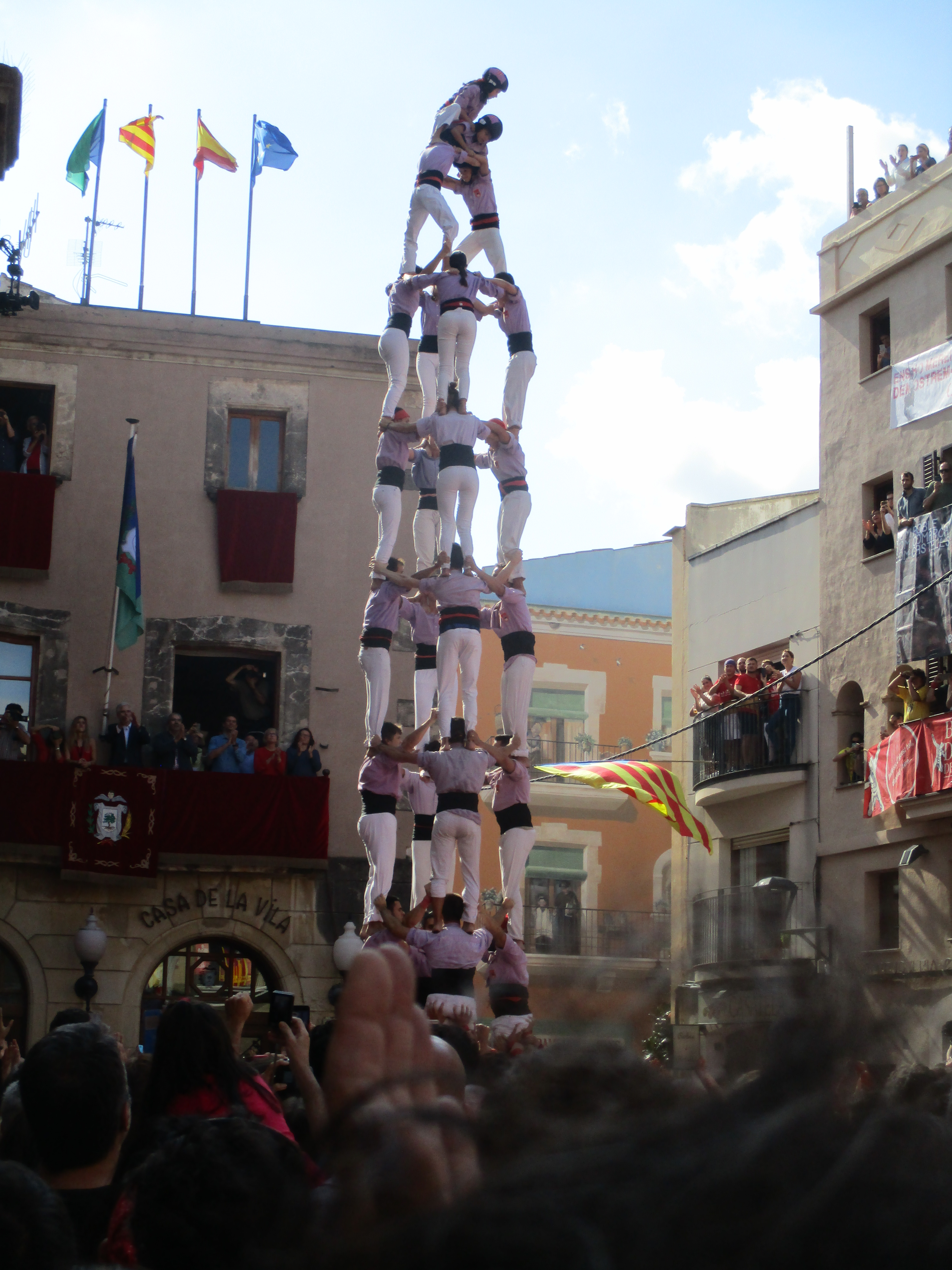 4de9sf carregat de la Colla Jove Xiquets de Tarragona, per la Fira de Santa Teresa del Vendrell. Primer de la seva història